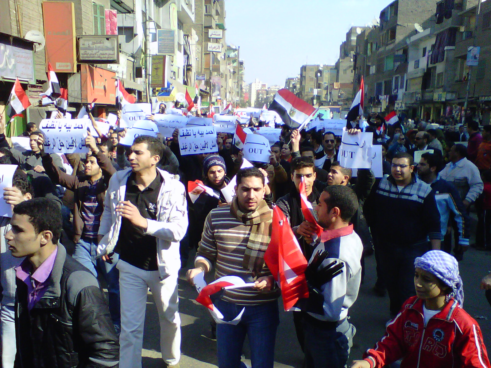 IMG00041-20110125-1342